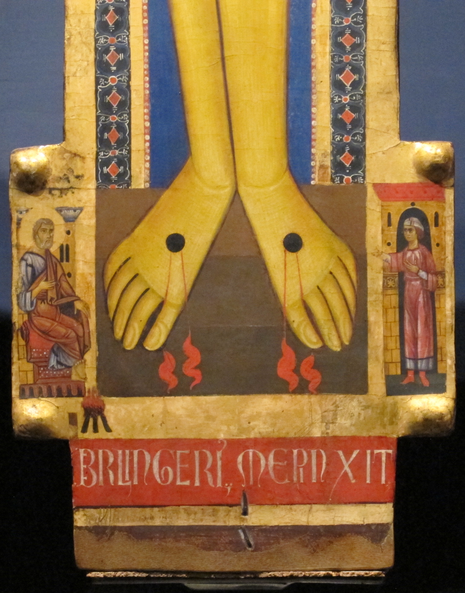 Museo nazionale di Villa Guinigi - MIBAC This is a photo of a monument which is part of cultural heritage of Italy.